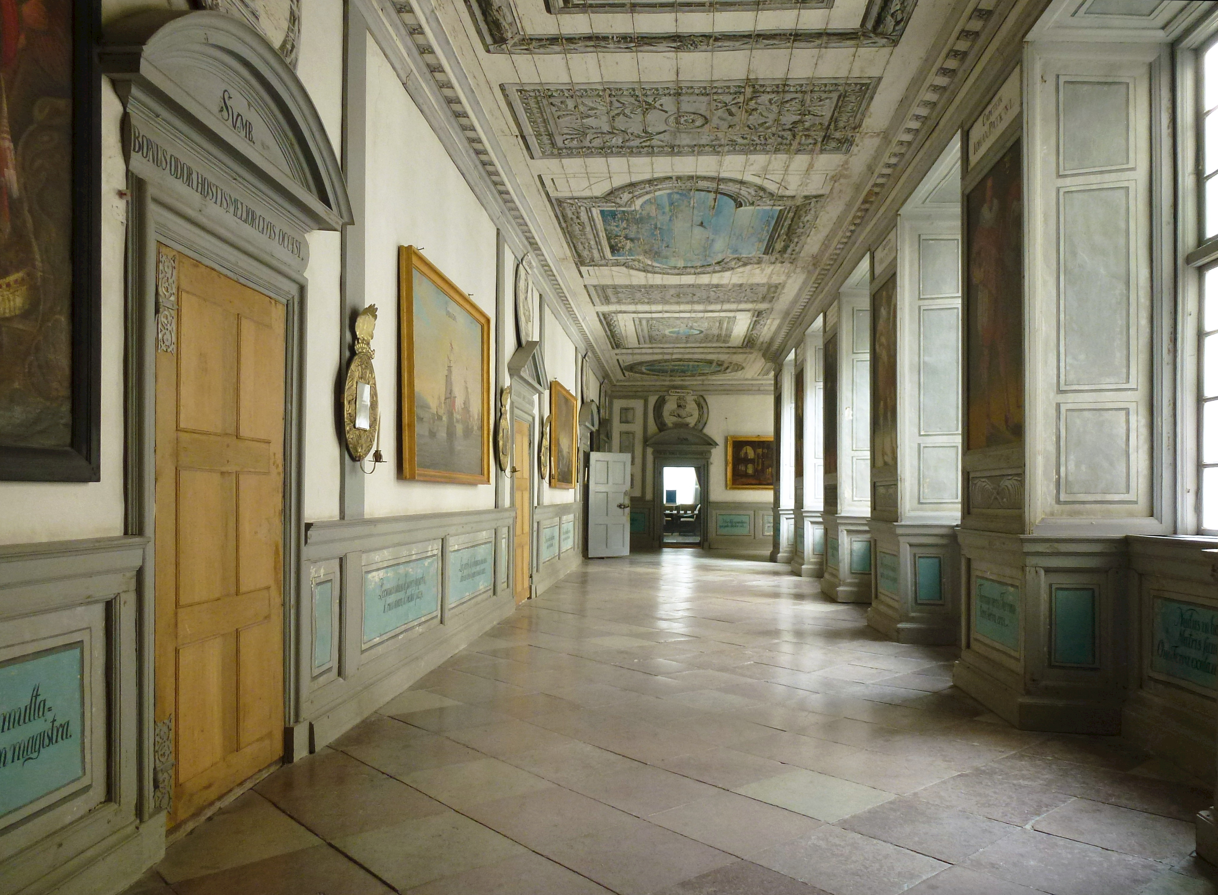 Skokloster korridor våning 1 tr